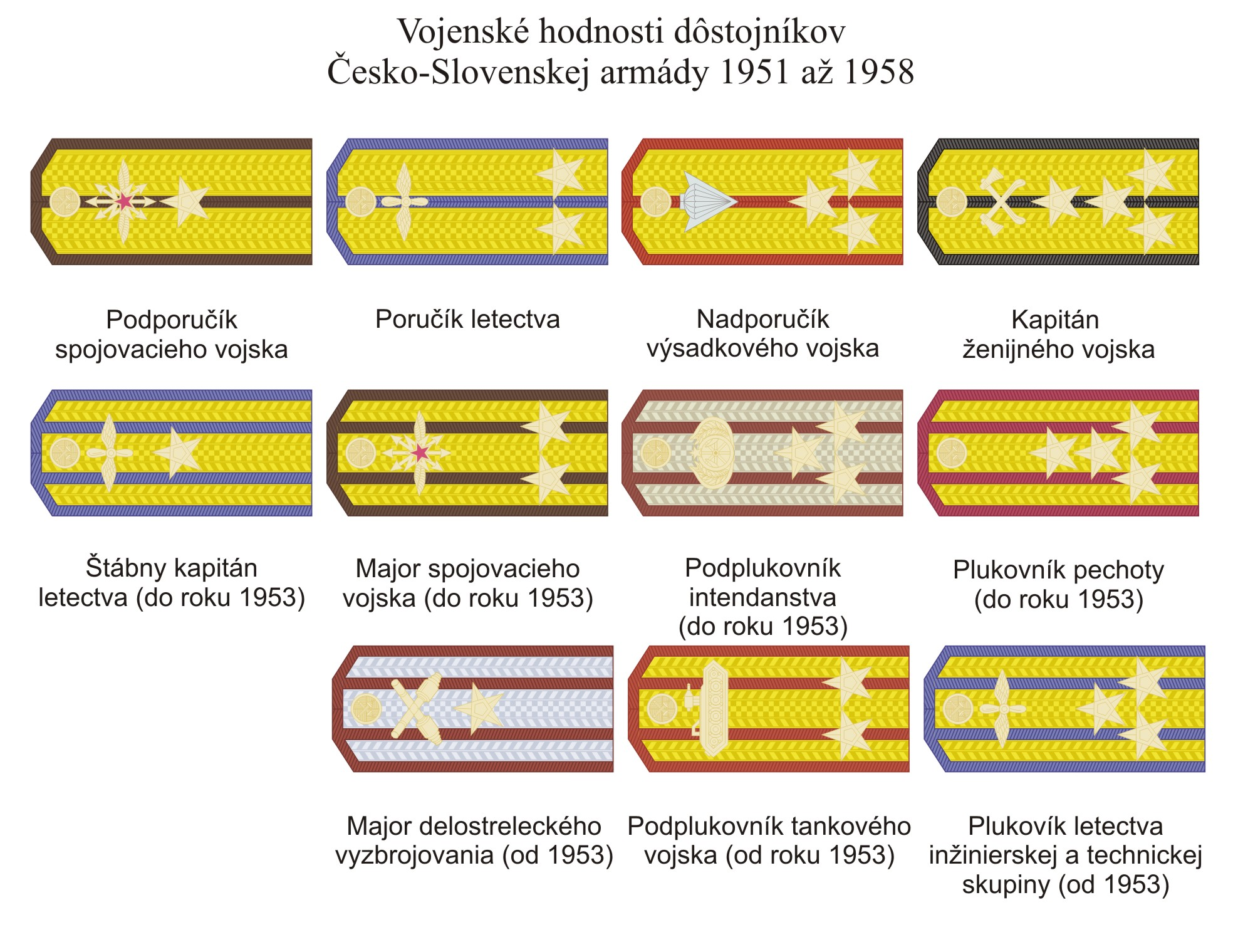 Vojenské hodnostné označenie dôstojníkov Česko-Slovenskej armády od roku 1951 do roku 1958